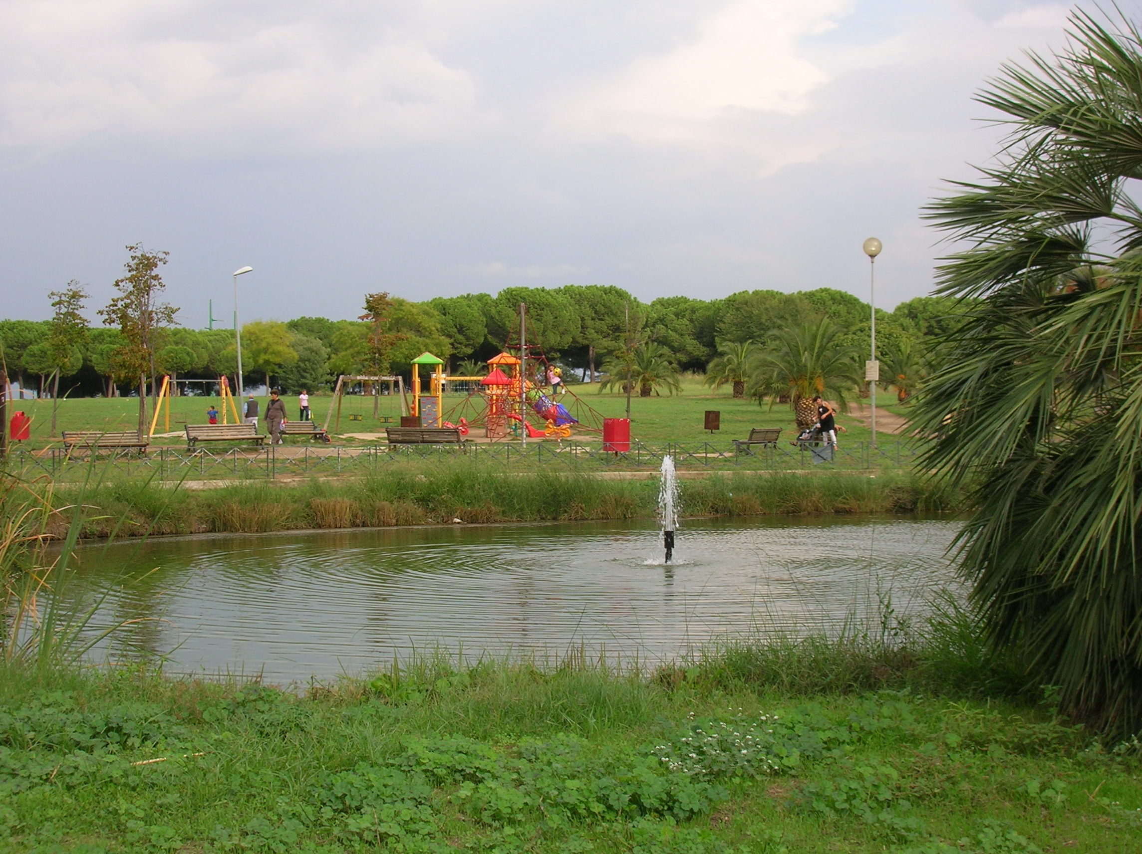 Parco Giovanni Palatucci, Tor Tre Teste, Municipio VII, Roma, Italia